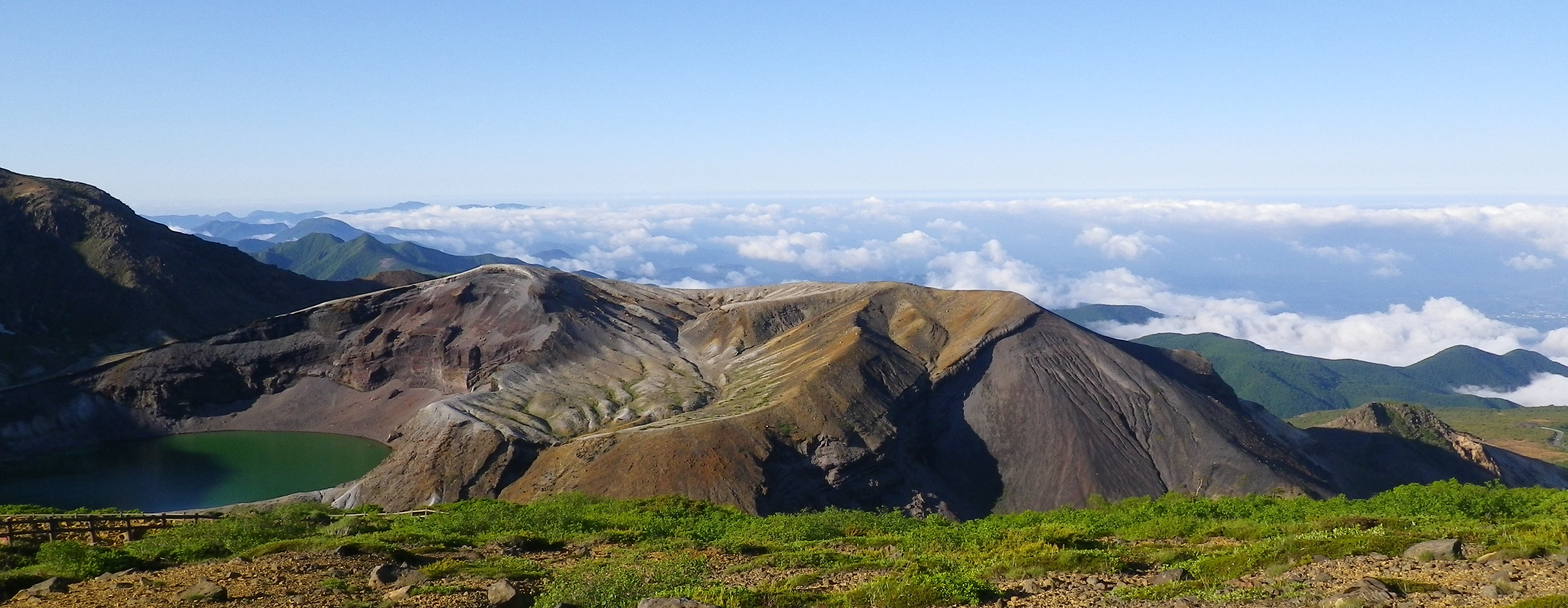 蔵王連峰・刈田岳から見た蔵王カルデラ。中央の窪地が旧火口、その左側の峰が中央火口丘の五色岳、その左側に火口湖の五色沼（御釜）がある。左上に外輪山の端が見えるが、東側にあたる外輪山が活動で崩壊しているため、写真中央から右側には外輪山が存在せず、仙台平野方面が望める。